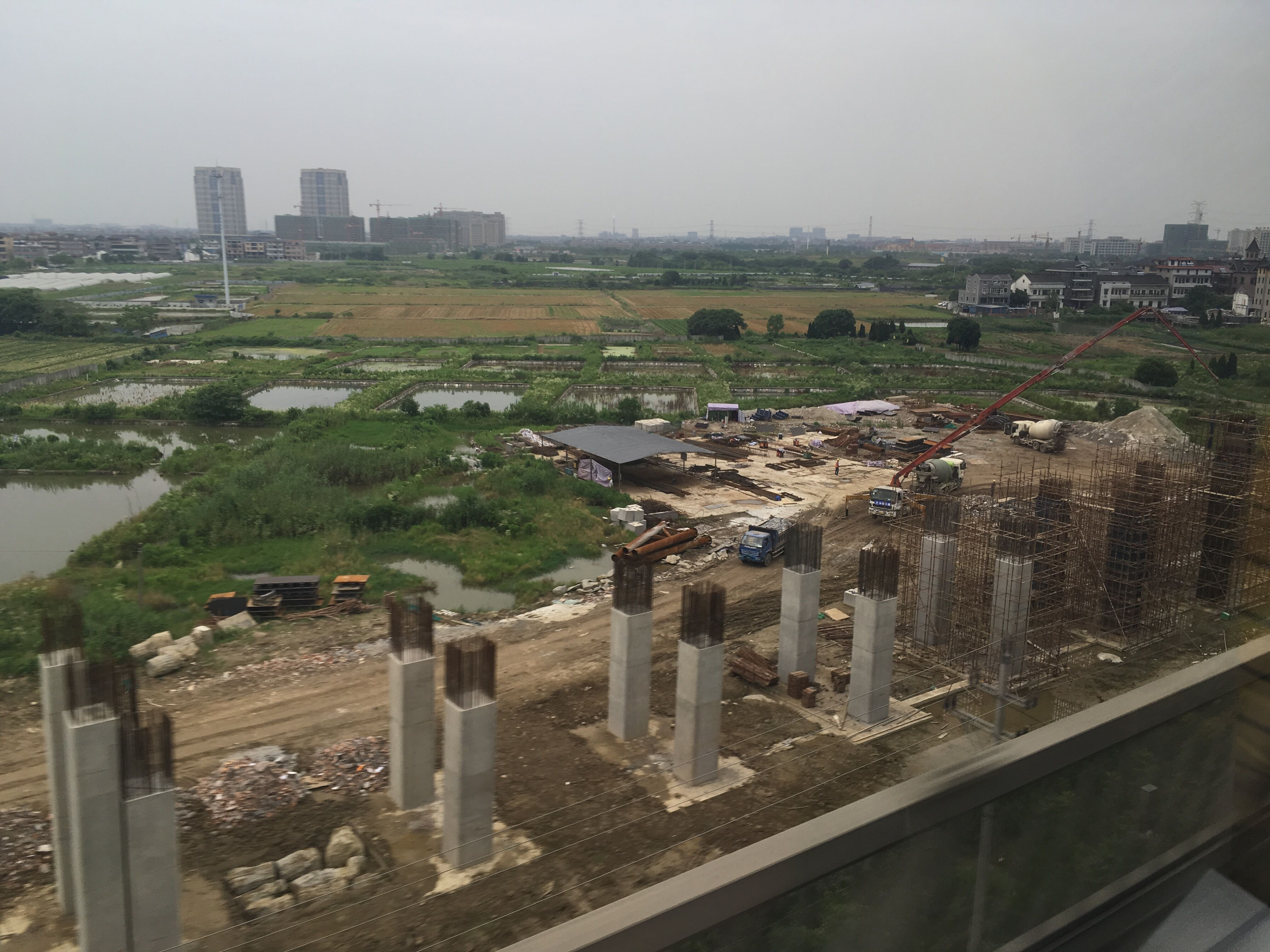 建设中的杭州地铁海宁线许村镇站